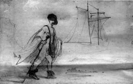 Self-portrait